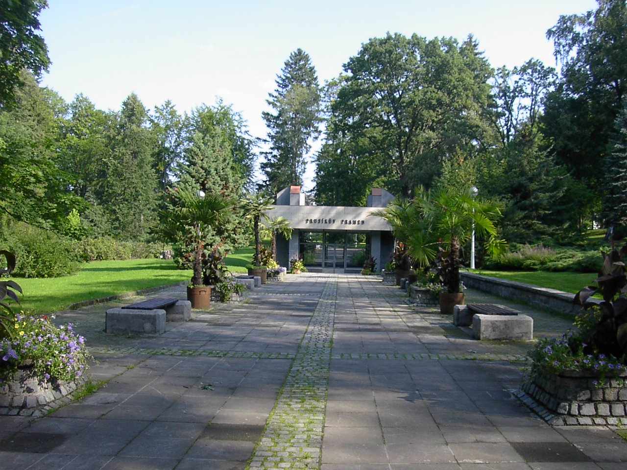 spa Konstantinovy Lazne, Czech Republic. Prusíkův pramen